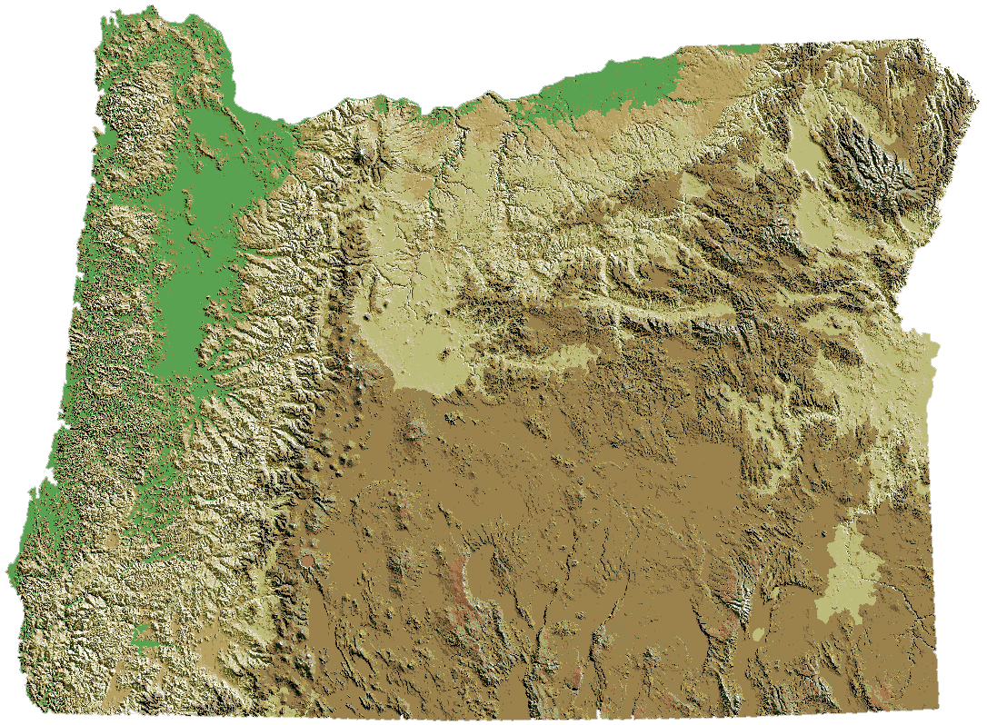 Oregon DEM relief map